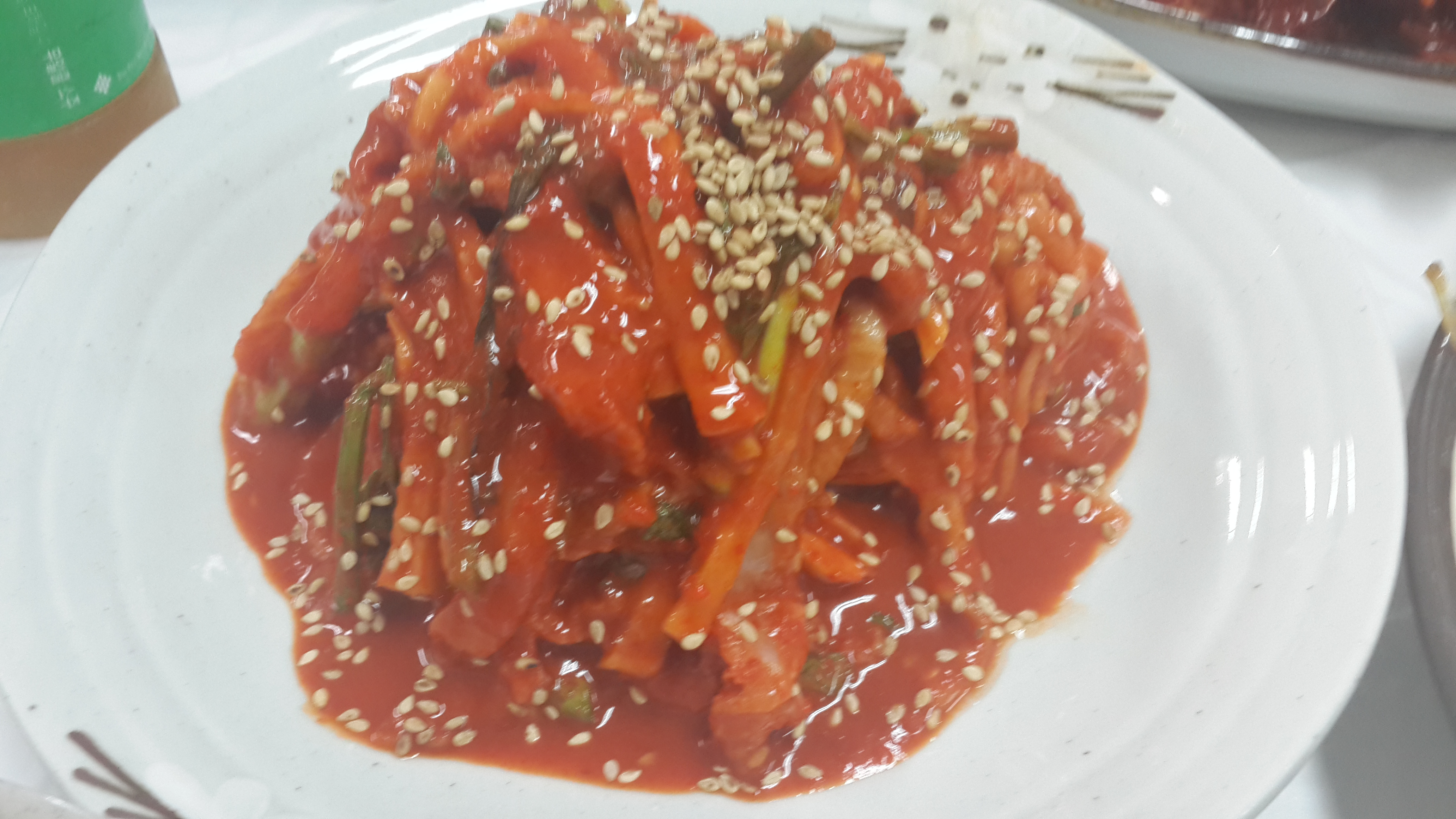 서대회무침. 서대는 납작한 생선으로 여수의 별미이다.